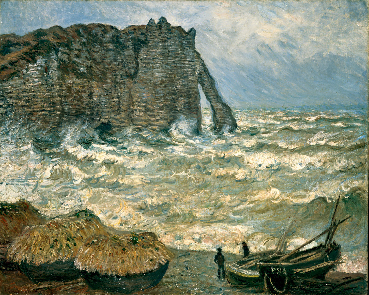 Agitated Sea at Etretatlabel QS:Lit,"Mare mosso a Étretat" label QS:Lfr,"Mer agitier à Étretat" label QS:Len,"Agitated Sea at Etretat" label QS:Lde,"aufgewühlte See bei Etretat"